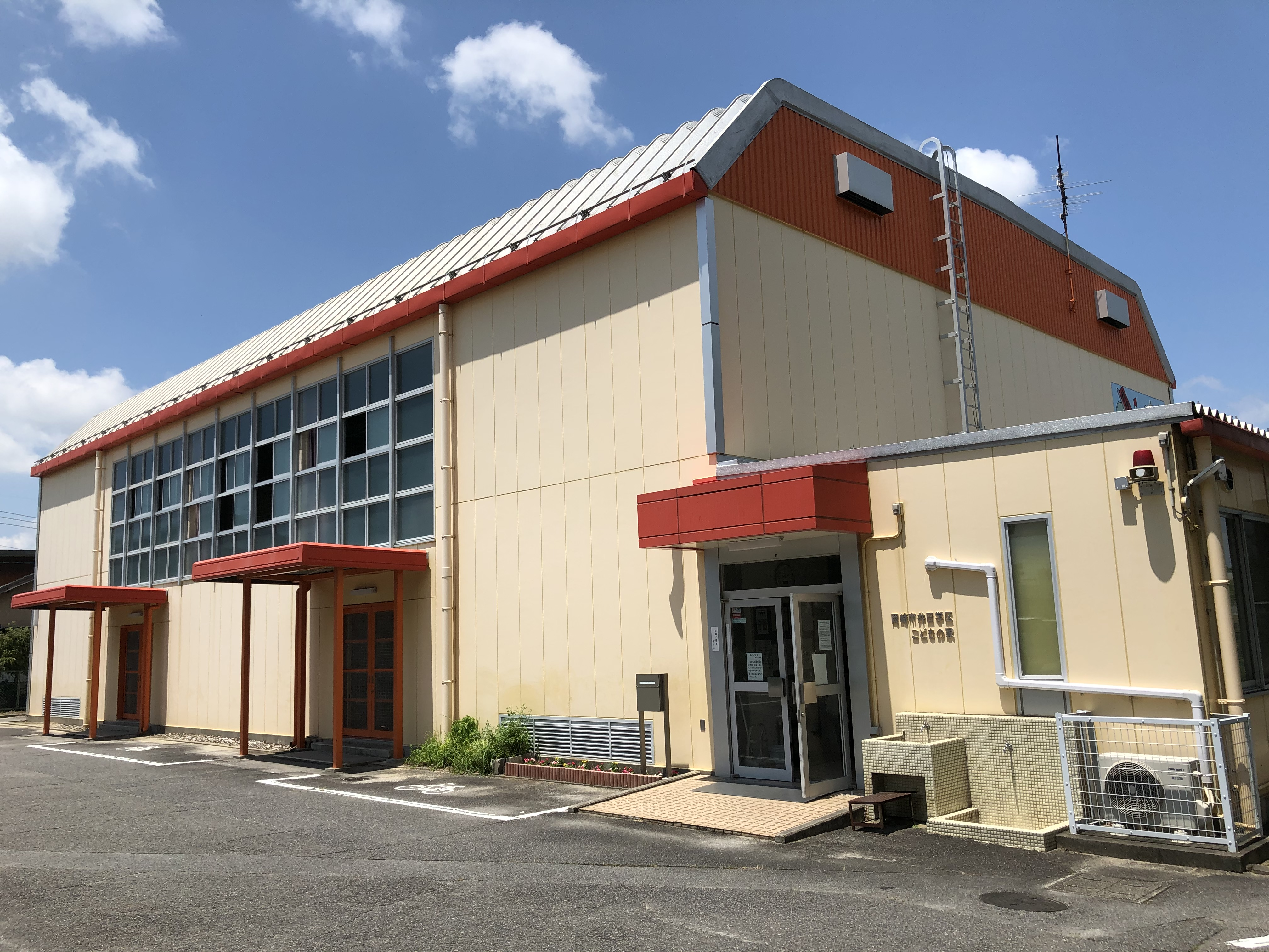 岡崎市井田学区こどもの家（岡崎市井田町）